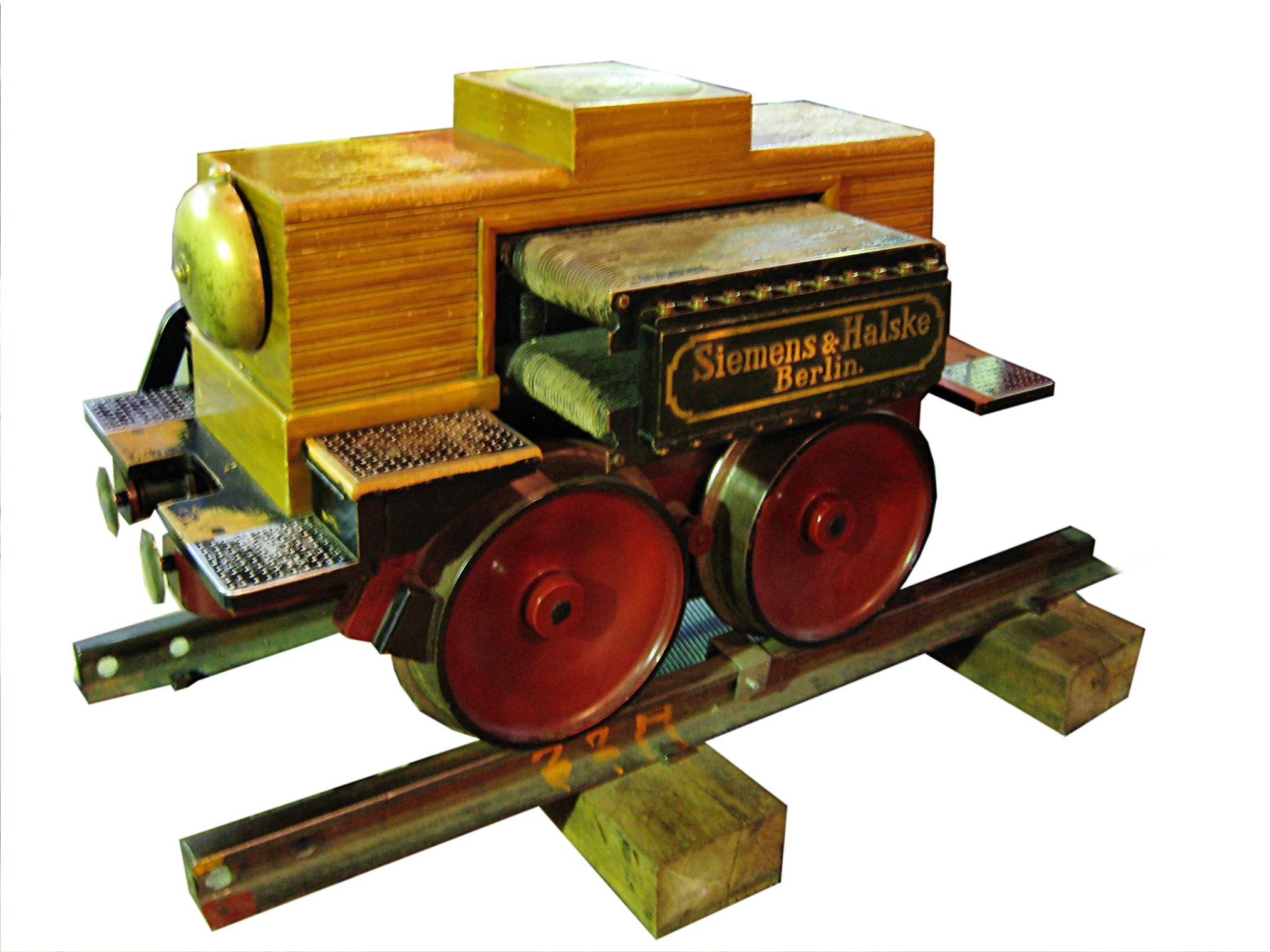 TSiemens Halske: Elektrisch betriebene Zugmaschine